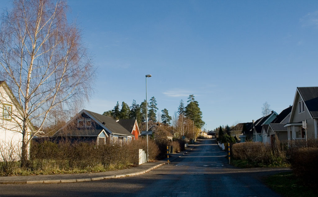 Skäcklinge 2000-tal, massor av hus och gott om plats för att köra bil. Området är byggt på 80-talet.; Foto: John Green 2006